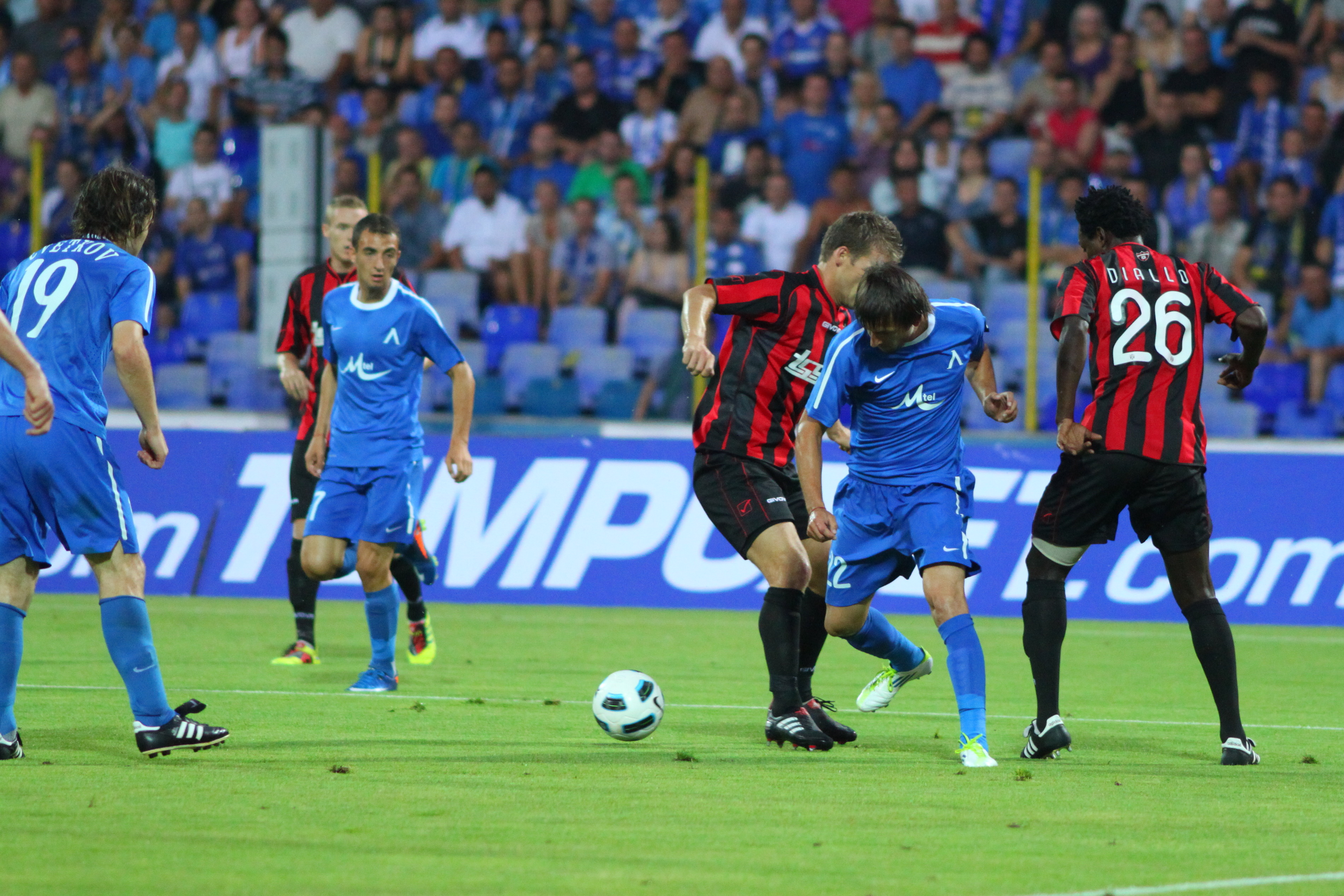 Момент от футболната среща от Лига Европа - Левски Сф-Спартак Търнава, 28 юли 2011 година.